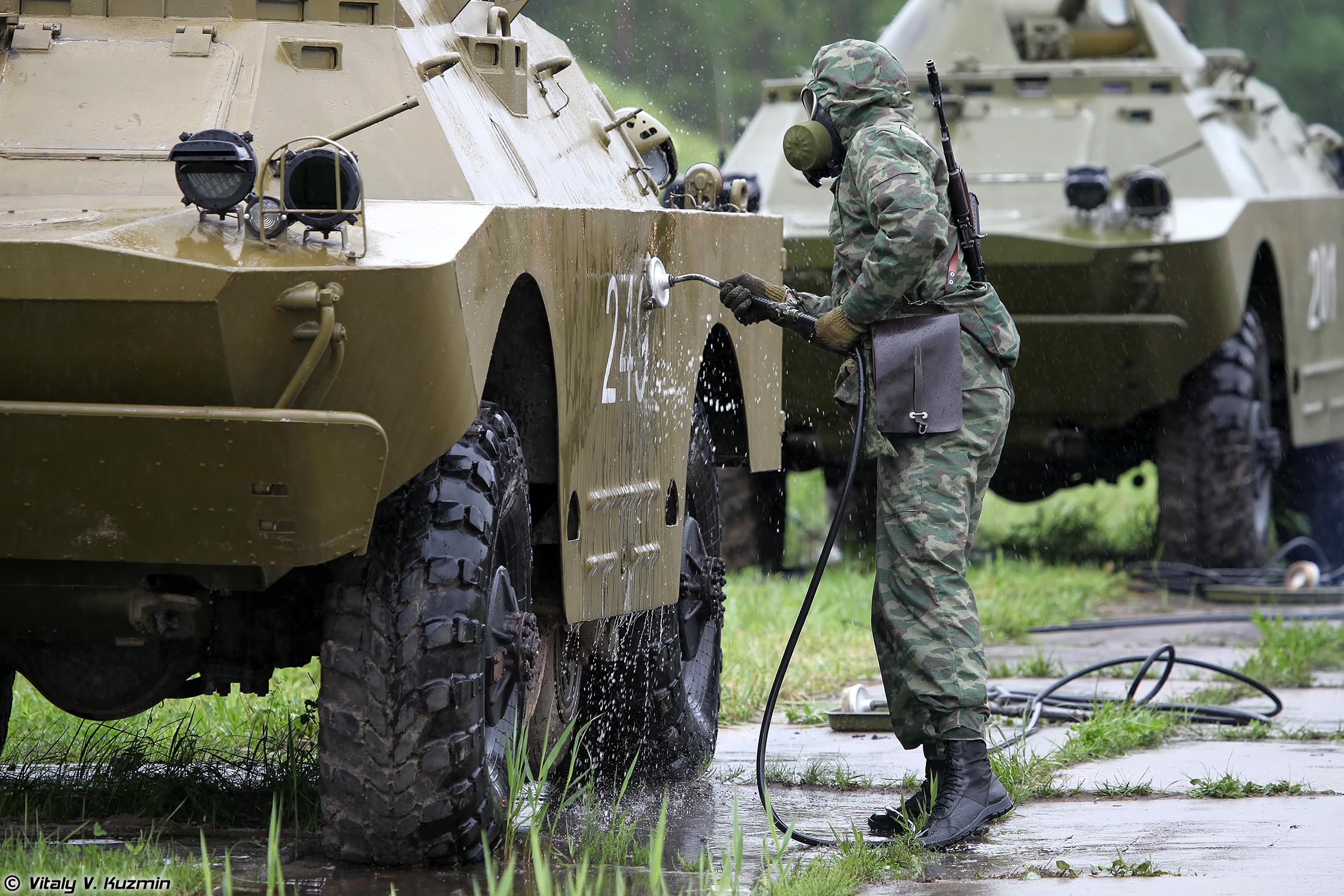 Дегазация и дезактивация военной техники при помощи авторазливочной станции АРС-14КМ (Decontamination of armored vehicles with ARS-14KM decontamination and degassing station)